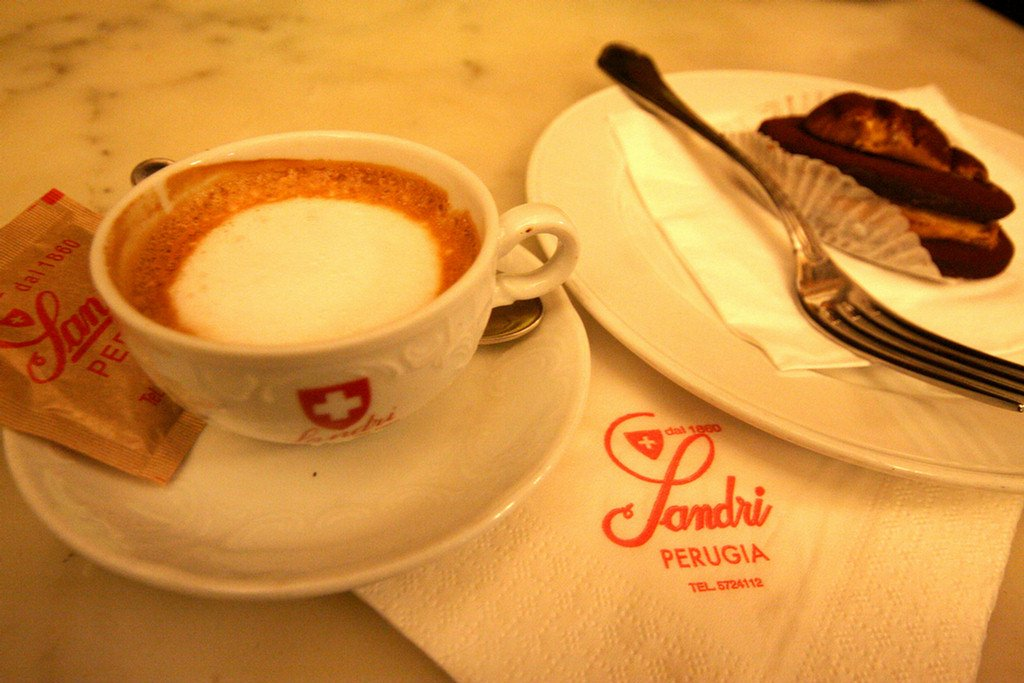 Caffè-Pasticceria Sandri in Perugia - Italia